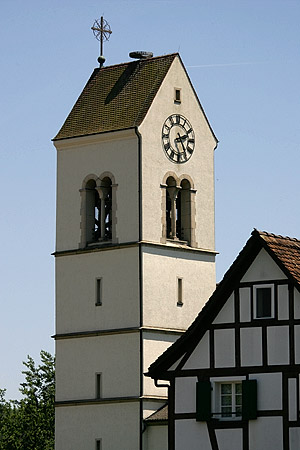 Katholische Pfarrkirche St.Peter und Paul in Oberwil (BL)